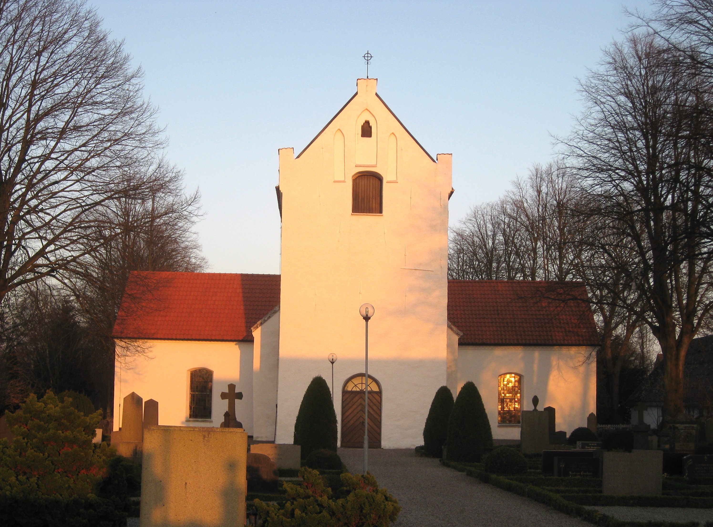 Nevishögs kyrka